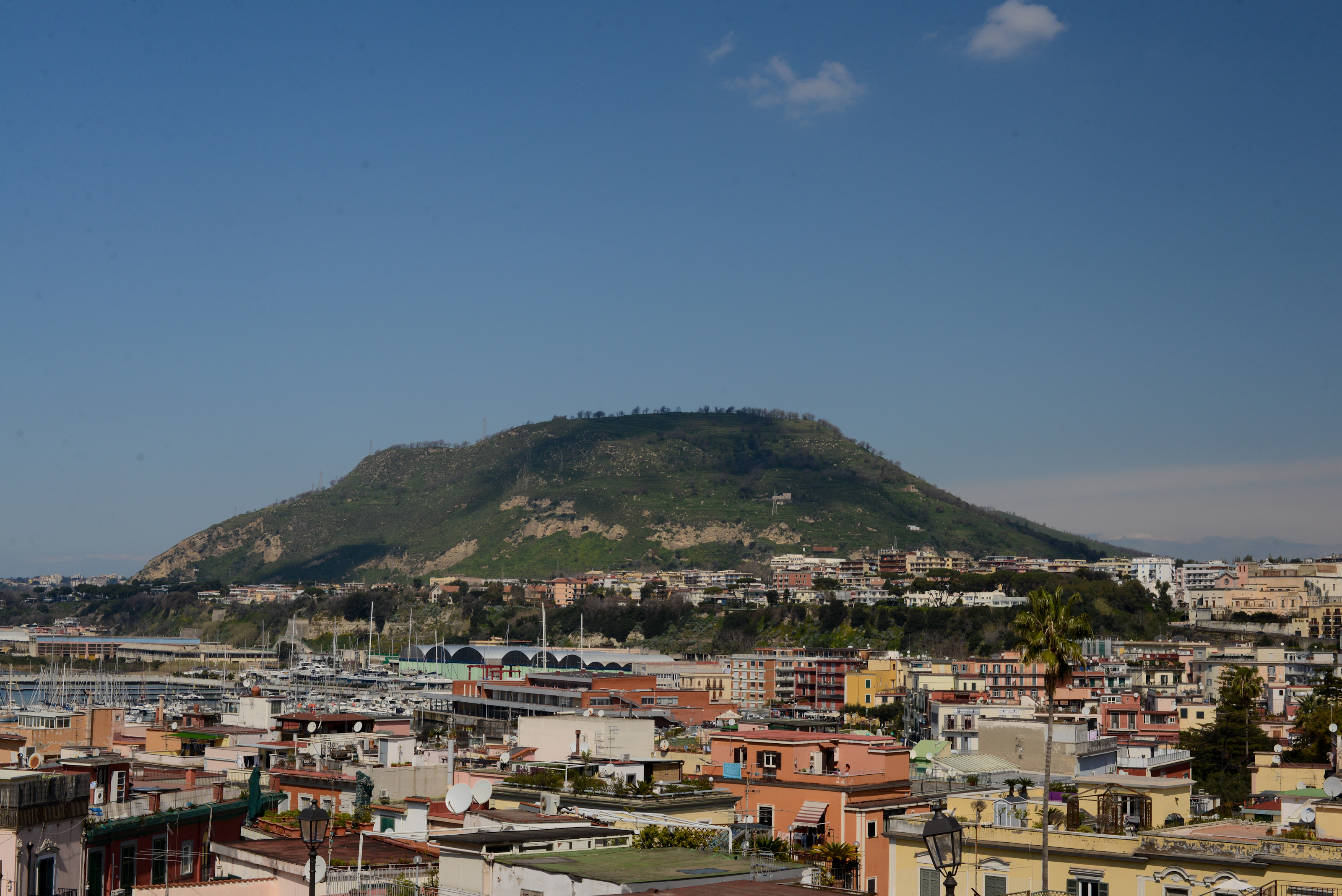 Monte Gauro, visto dal Rione Terra